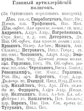 Список начальствующего состава Главного артиллерийского полигона.